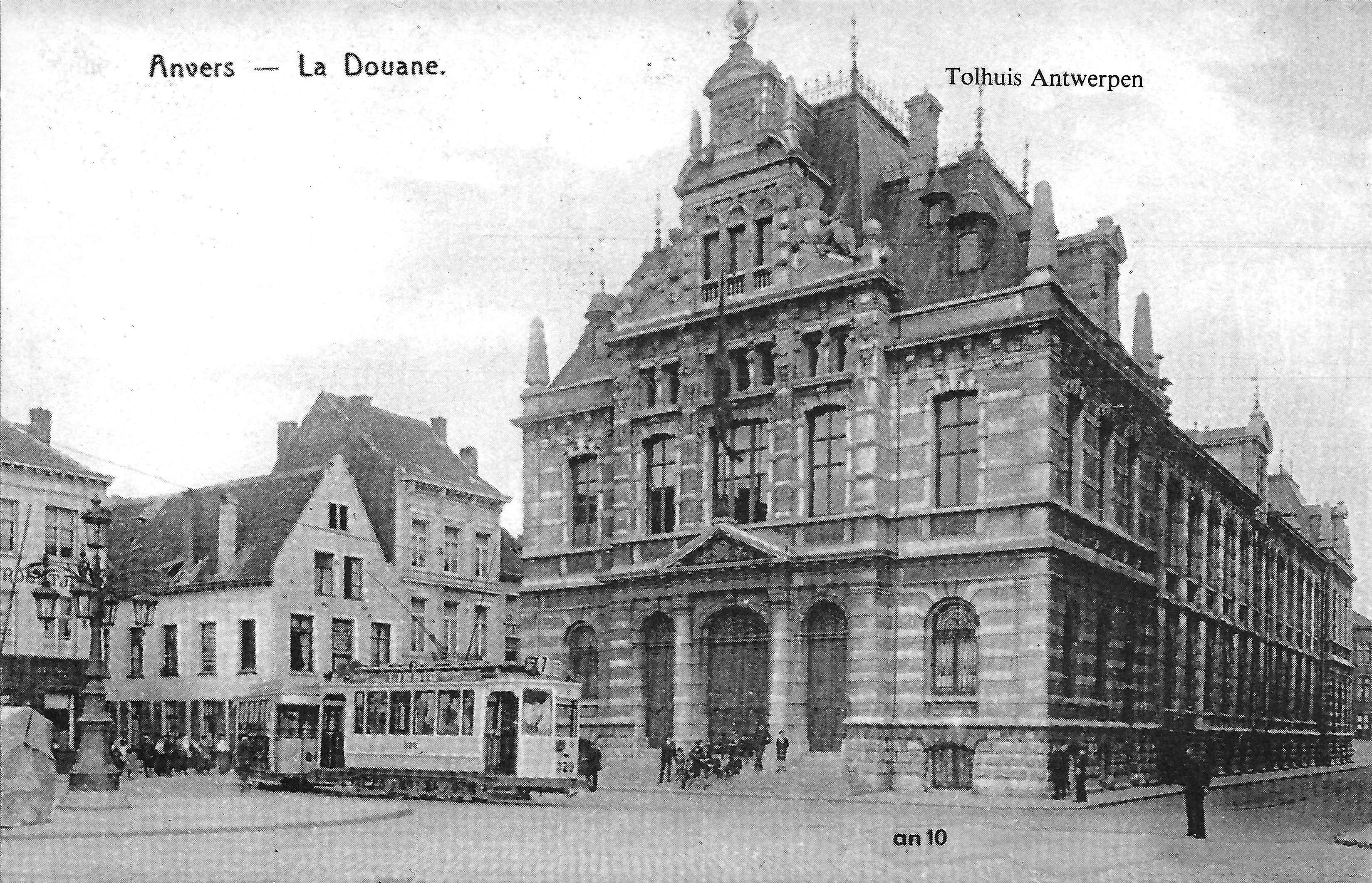 Tram 7 bij de keerlus Tolhuis in 1907. Deze keerlus wordt nog steeds gebruikt door de huidige tramlijn 7.